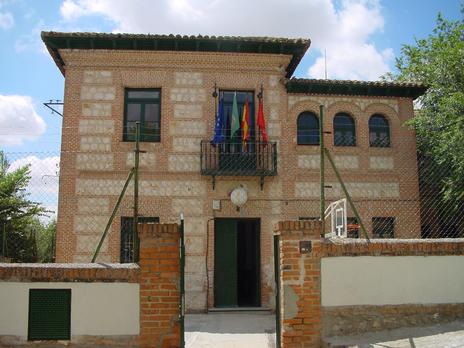 Colegio de Carabaña.